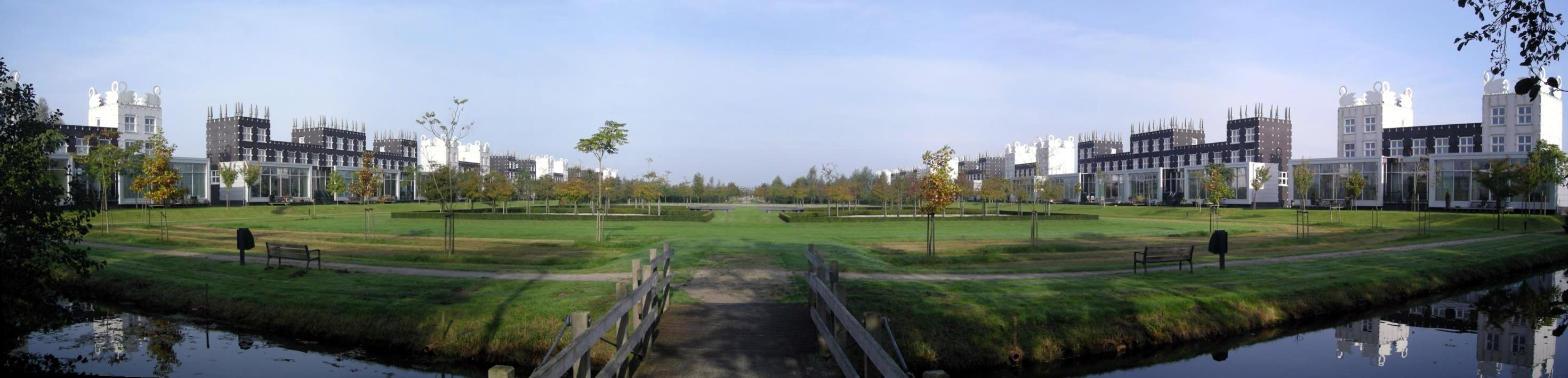 Residentie Zwanenwoud in de woonwijk Skoatterwald te Heerenveen